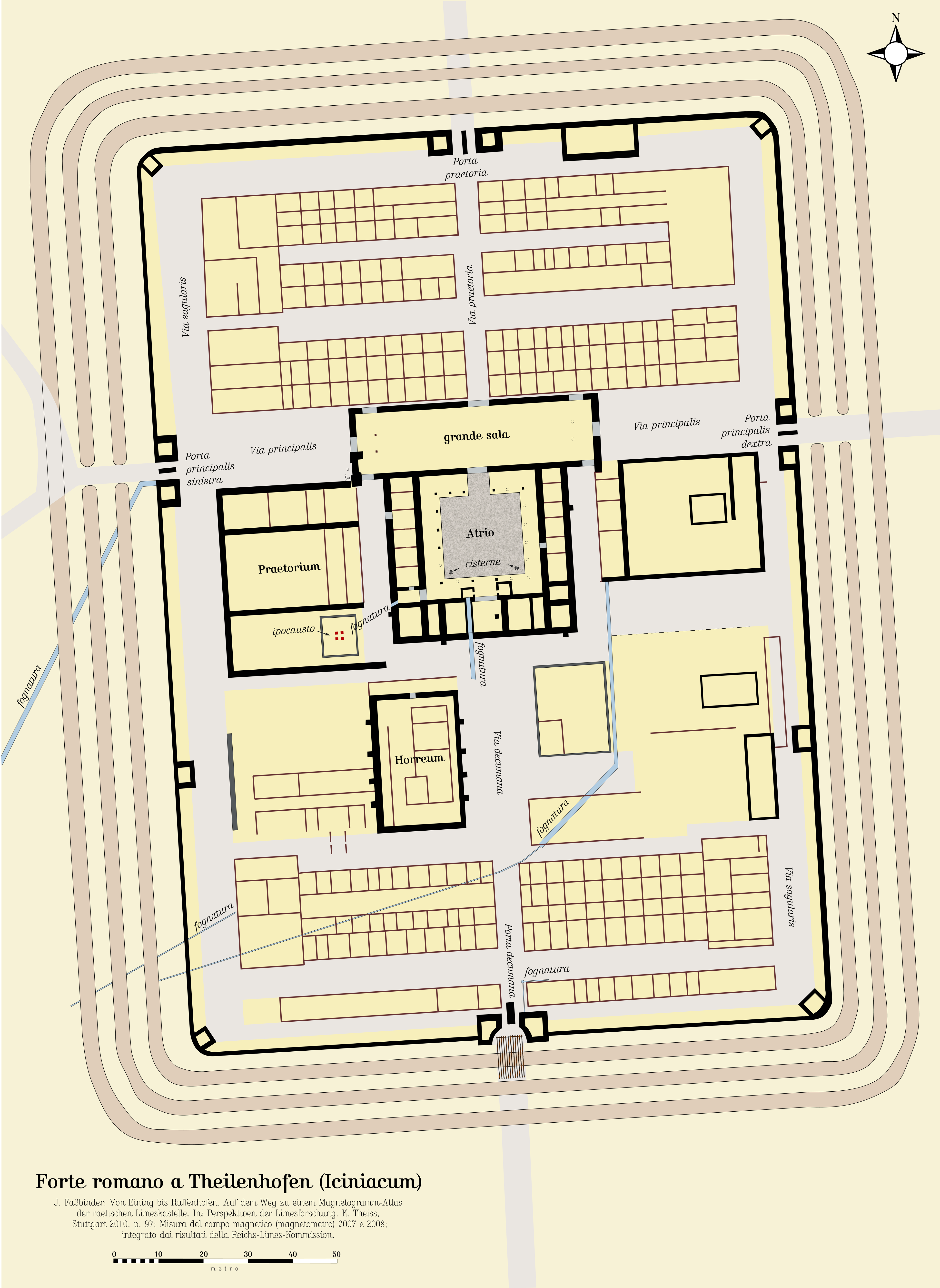 Kastell Theilenhofen (Iciniacum) nach den zwischen 1879 und 1895 erschlossenen Befunden sowie den Magnetometermessungen 2007 und 2008. Siehe dazu die in der Datei direkt angegebenen Quellen.